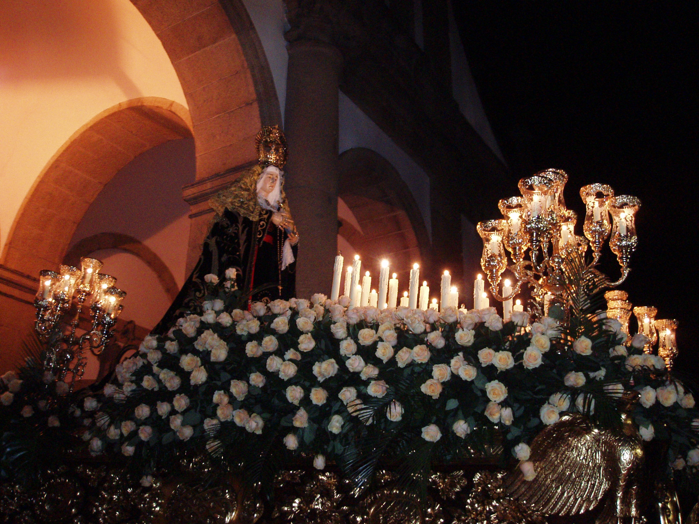 La Santísima Virgen de los Dolores sale de la Concatedral de San Xiao, al comienzo de la procesión de "Os Caladiños" de 2.007